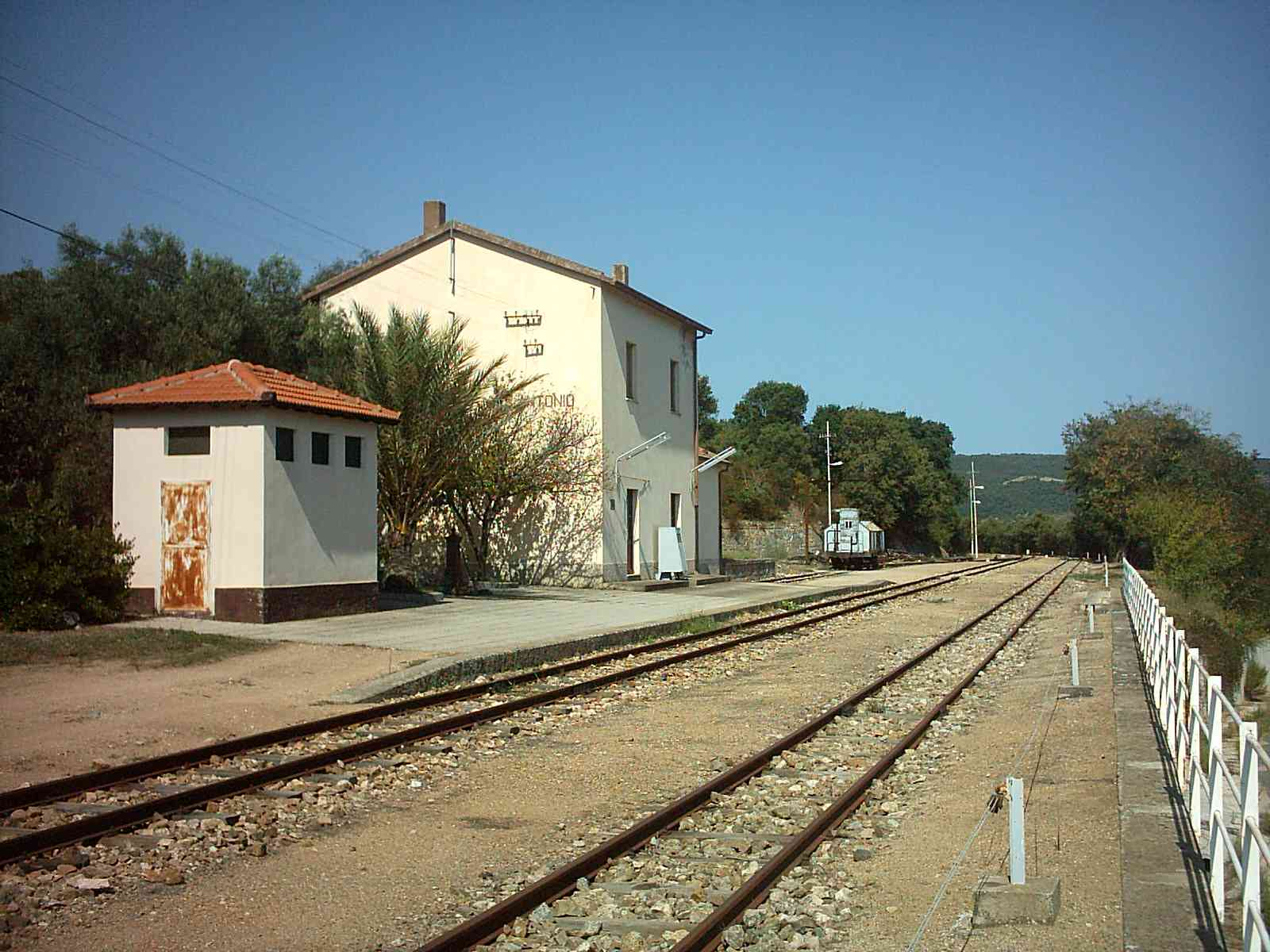 S.Antonio di Gallura (OT) Sardegna - Italy Stazione ferroviaria